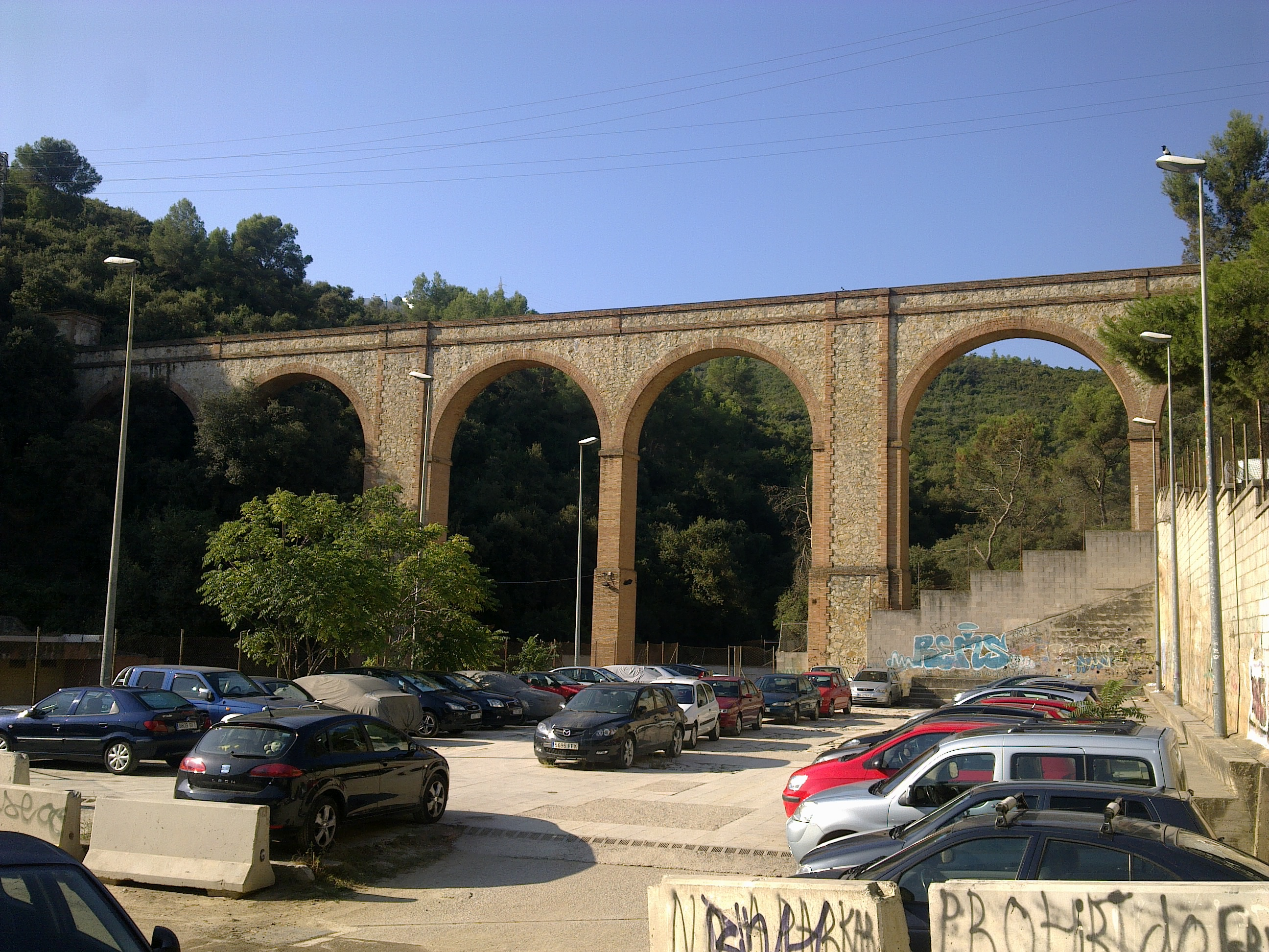 Barcelona